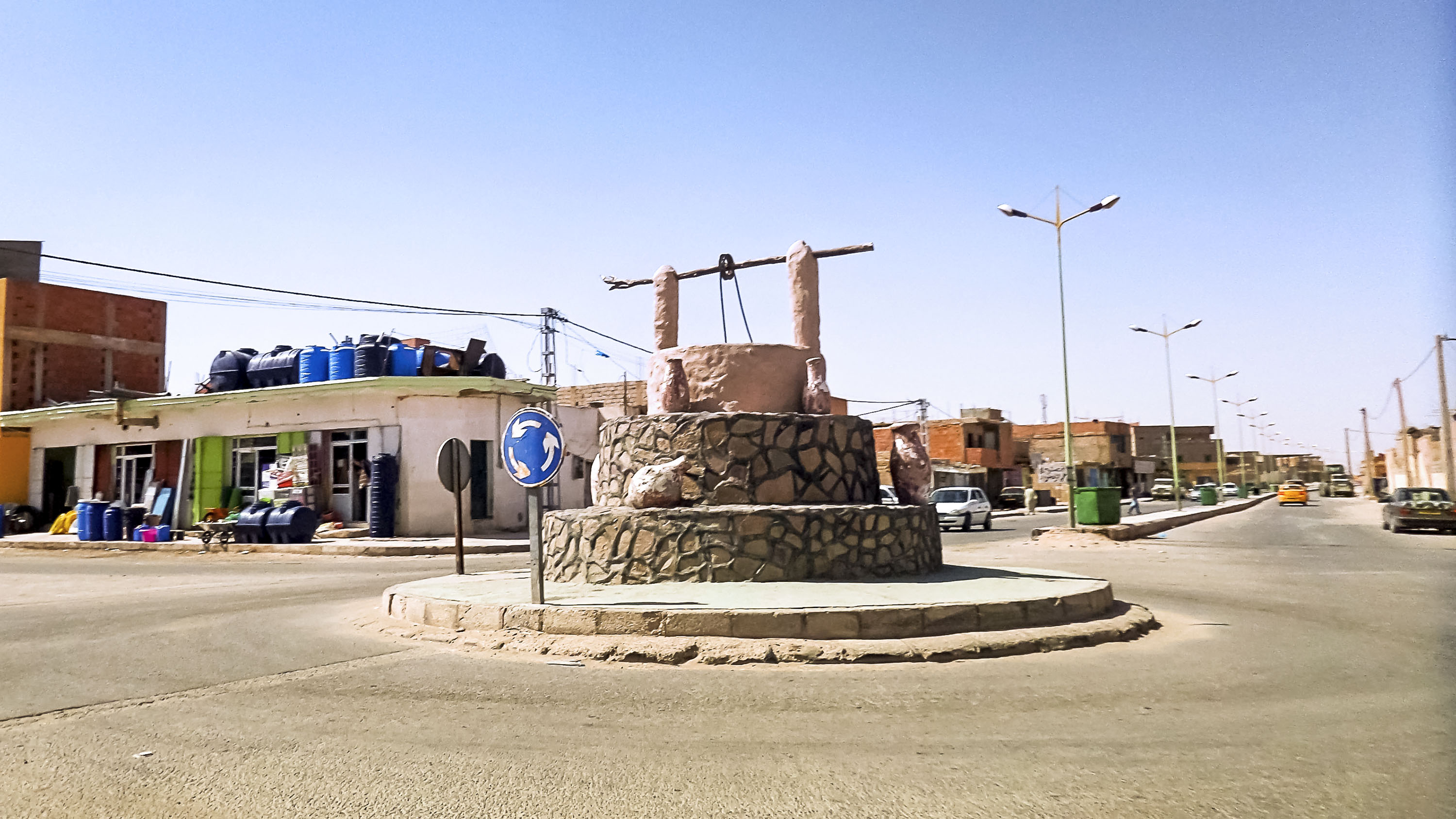 Ville de Tindouf مدينة تندوف